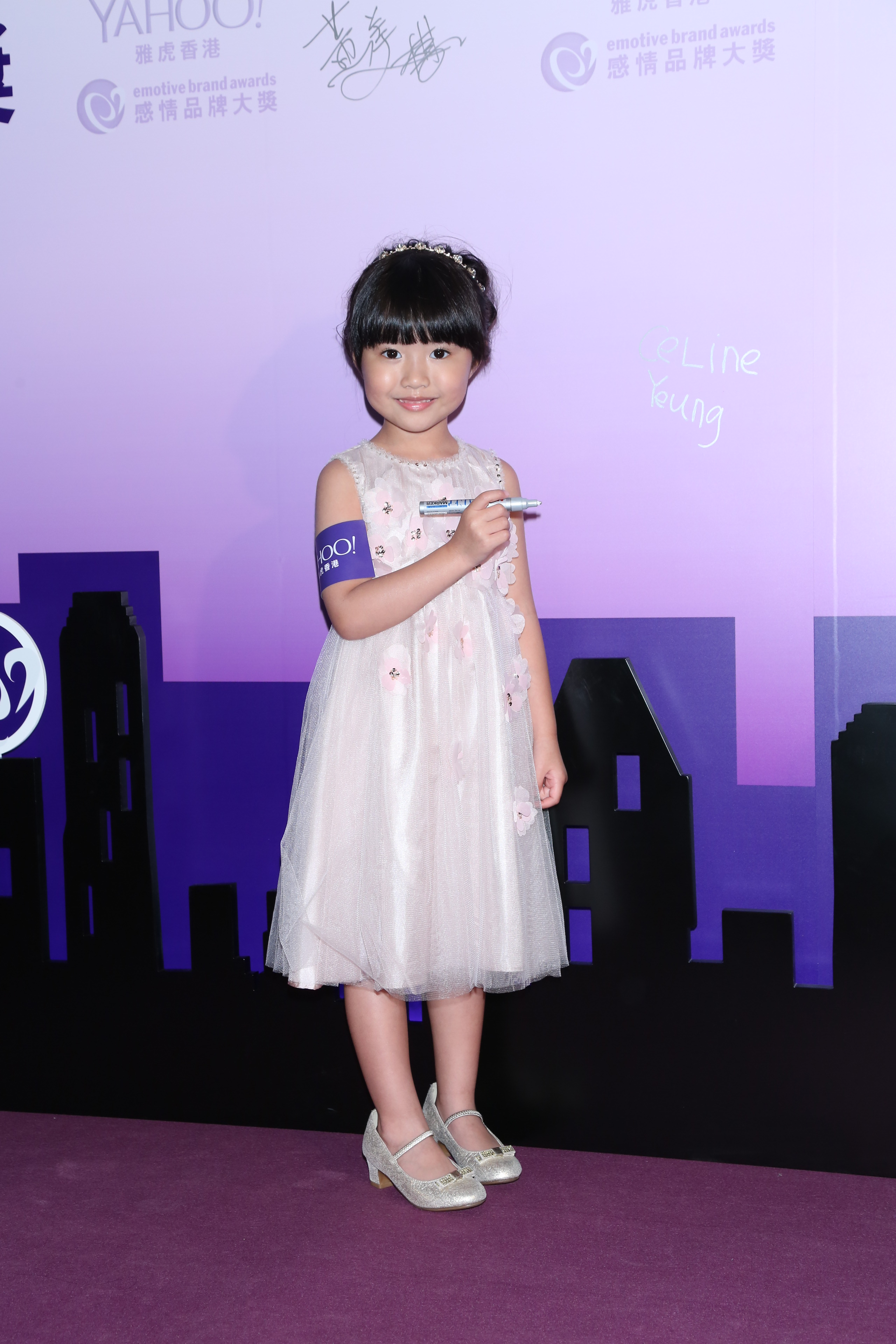 中文（香港）: Yahoo 感情品牌大獎2014